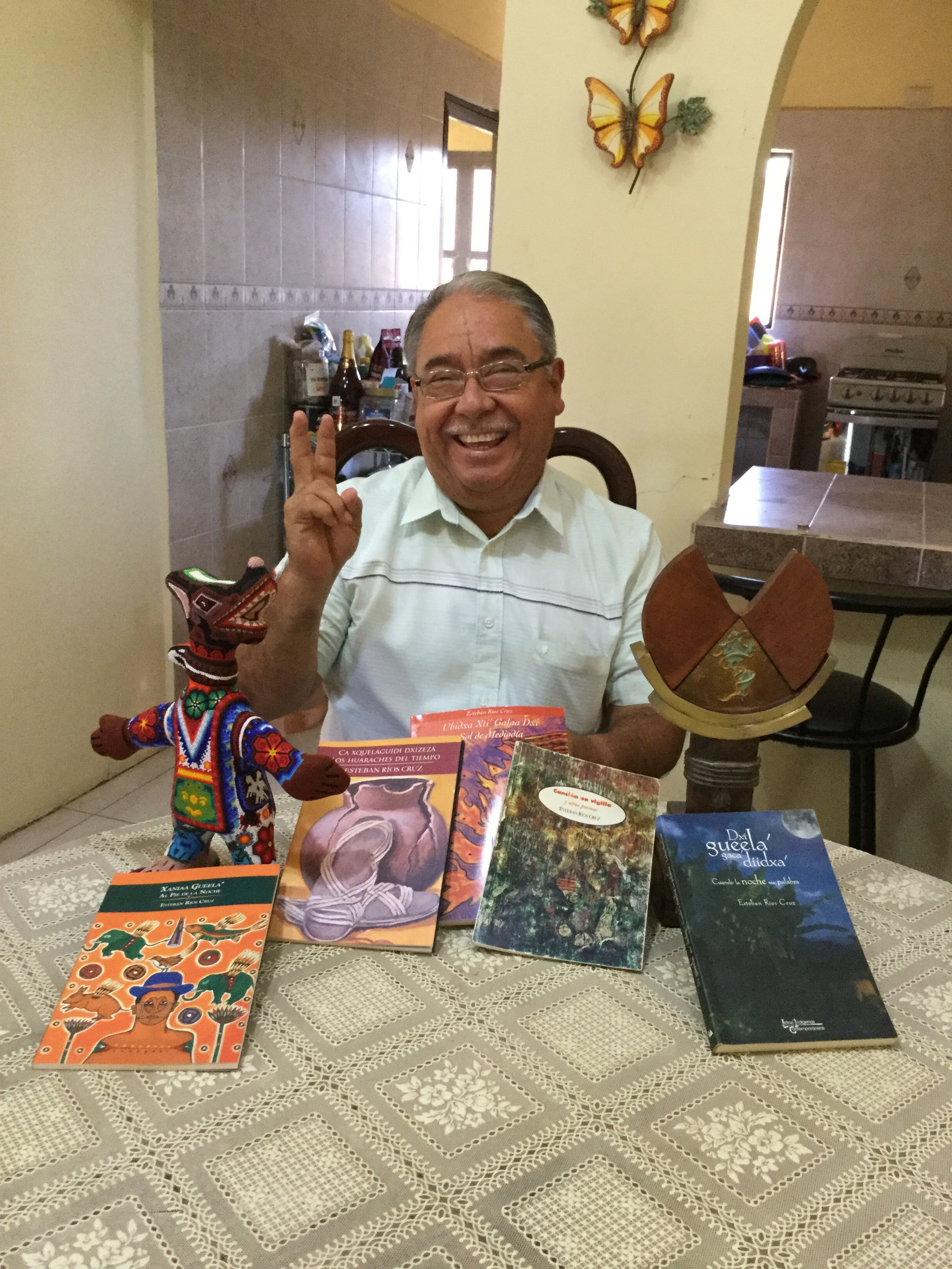 El autor, sus obras y sus premios